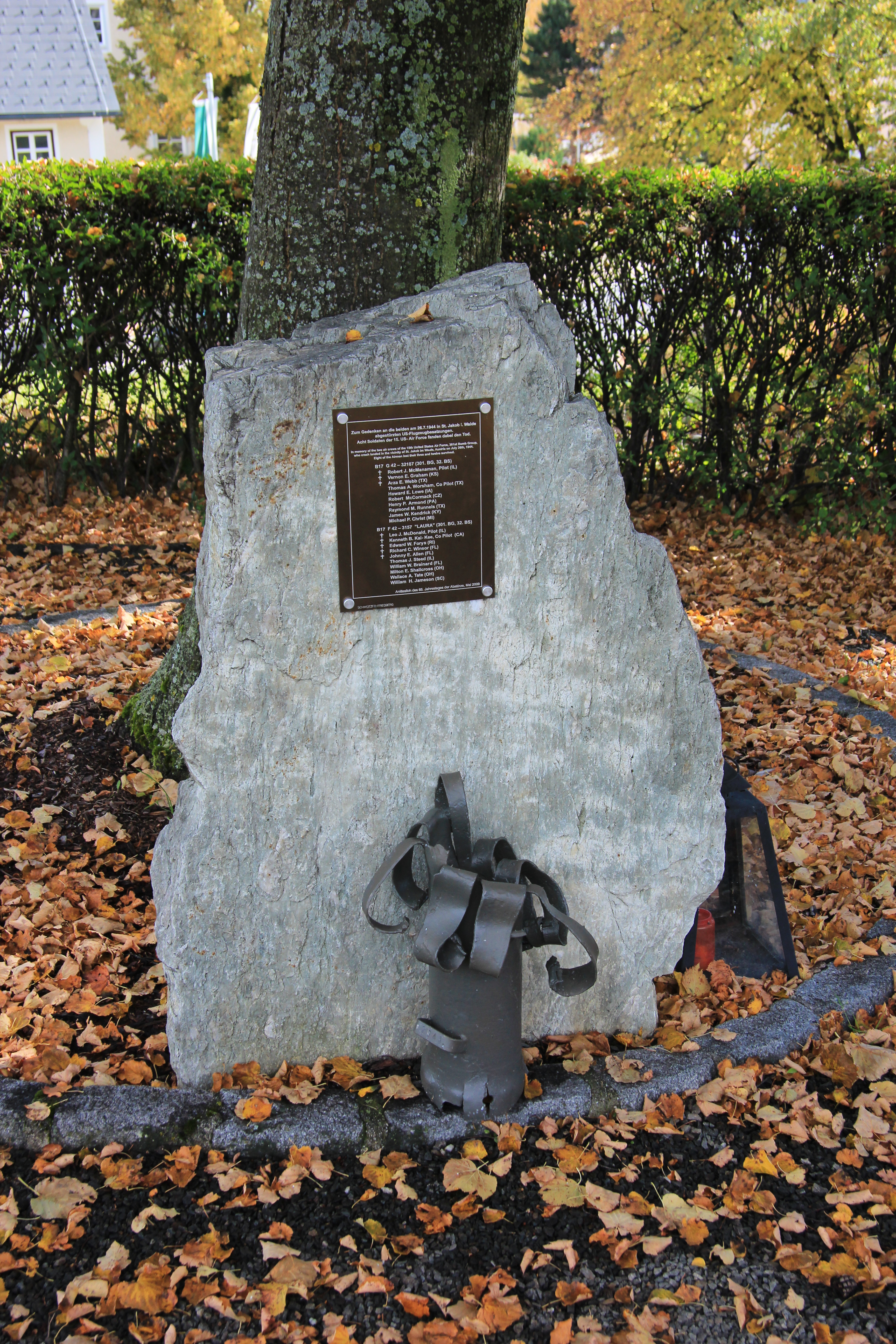 Sankt Jakob im Walde im steirischen Joglland